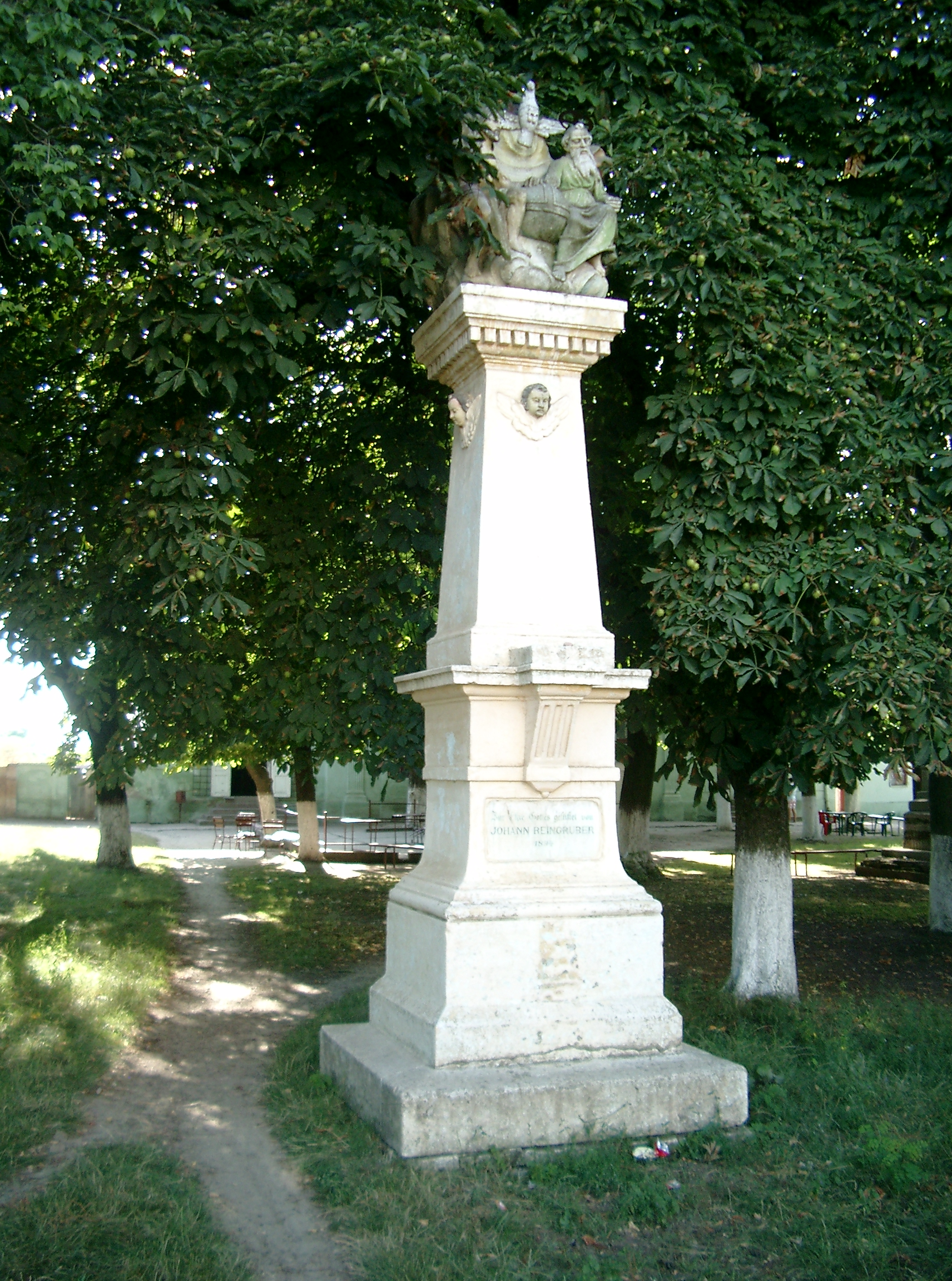 Wiesenheid, Denkmal